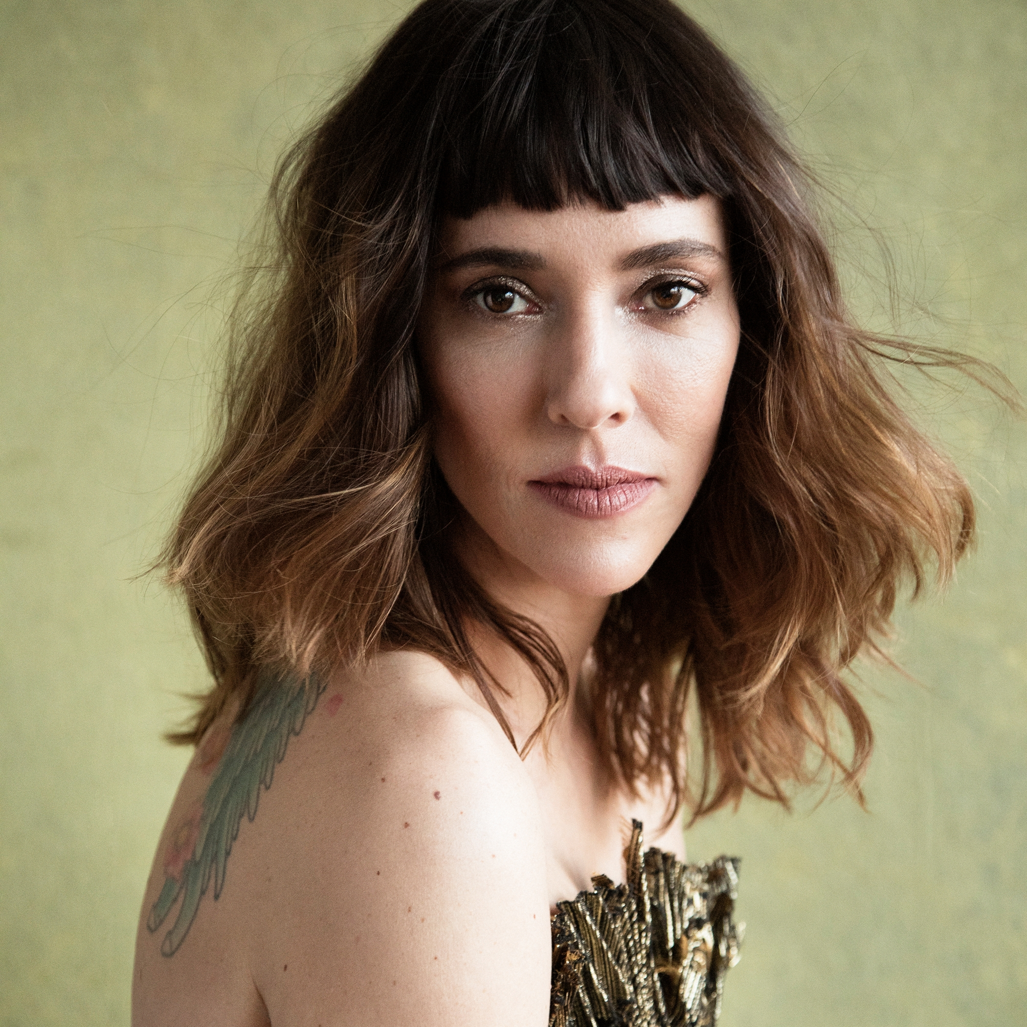 Catherine Pogonat par Pascale Thérien